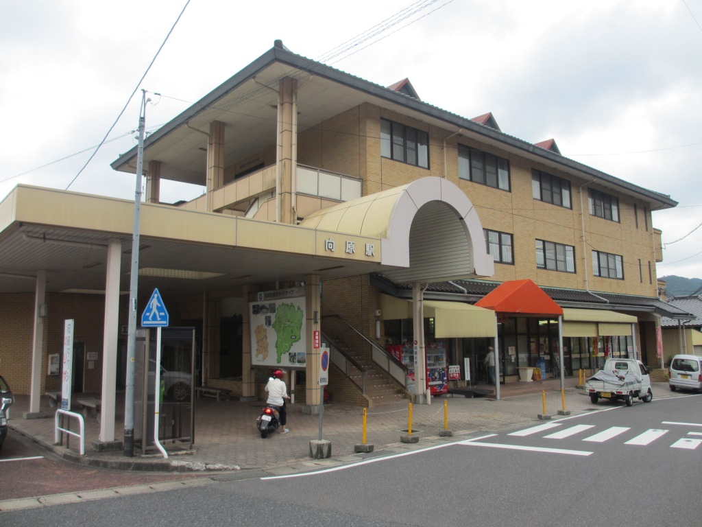 JR芸備線 向原駅